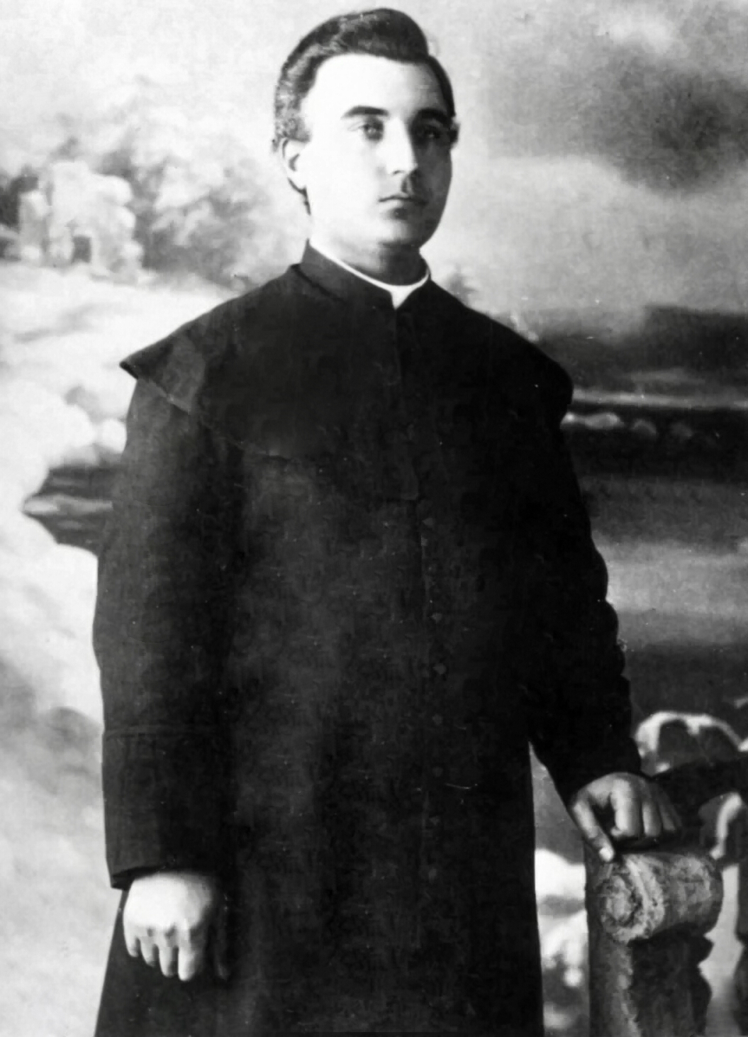 Ortsfamilienbuch